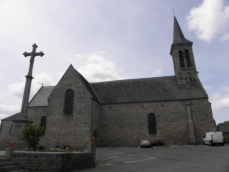 Vue latérale de l'église Saint-Martin de Noyal-sous-Bazouges (35).